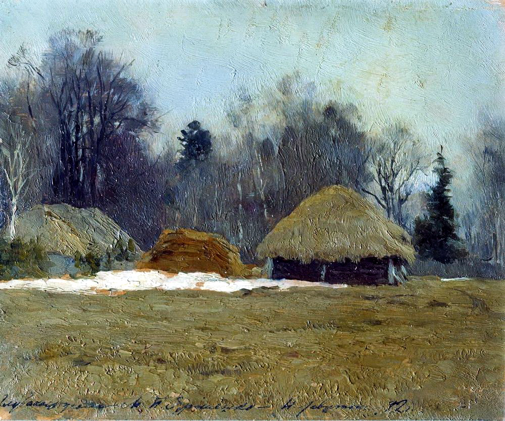 Ранняя весна